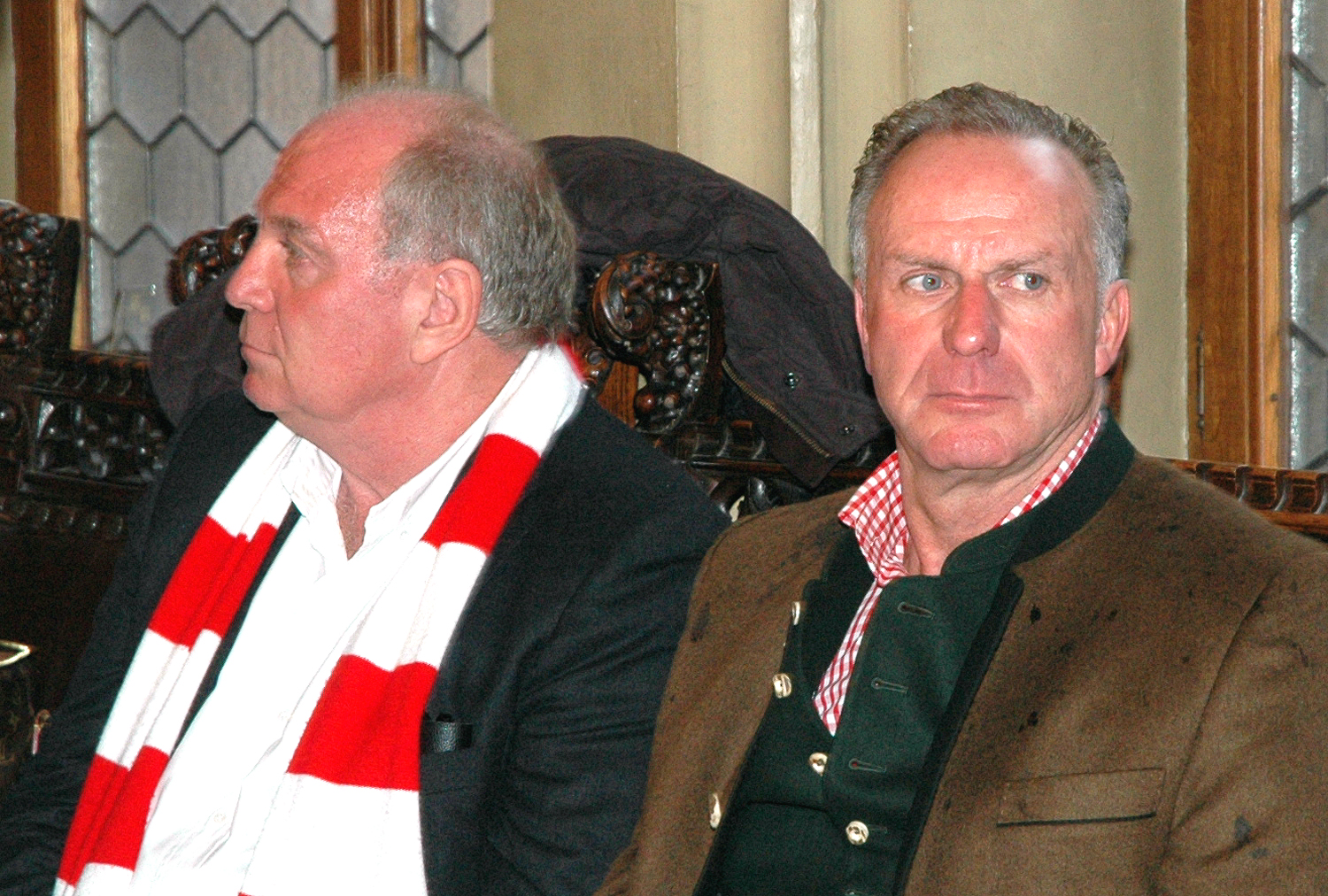 Uli Hoeneß mit Karl Heinz Rummenigge während der Siegesfeier des FC-Bayern im Münchner Rathaus